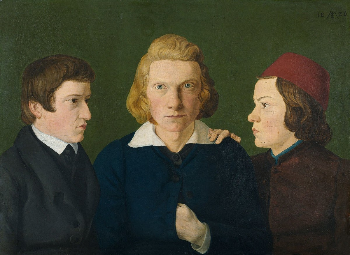 Carl Julius Milde: Self-portrait between Julius Oldach and Erwin Speckterlabel QS:Lde,"Carl Julius Milde: Selbstbildnis zwischen Julius Oldach und Erwin Speckter"label QS:Len,"Carl Julius Milde: Self-portrait between Julius Oldach and Erwin Speckter"